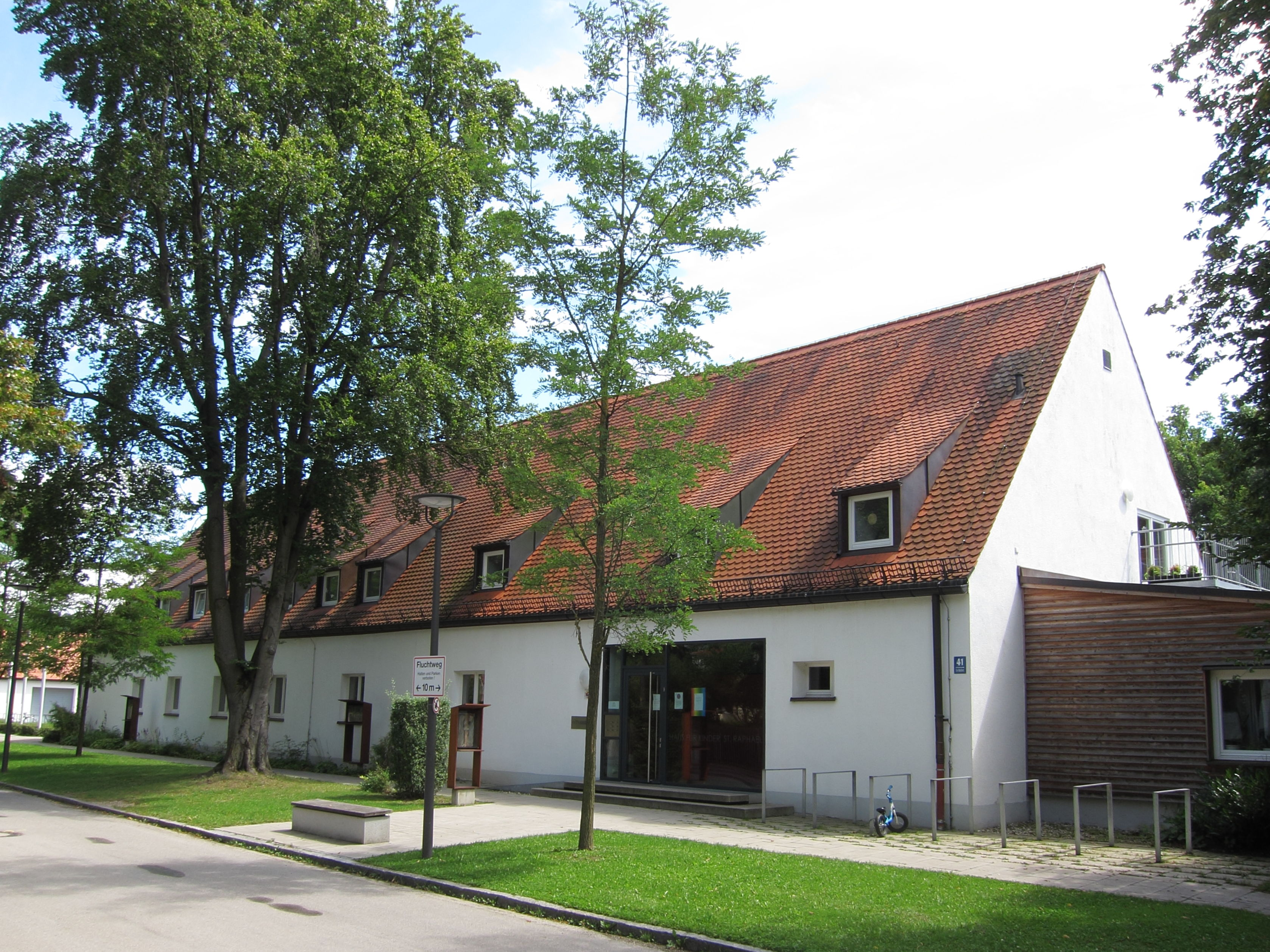 Haus für Kinder St. Raphael, gegenüber der Pfarrkirche St. Raphael, Moosach-Hartmannshofen, München